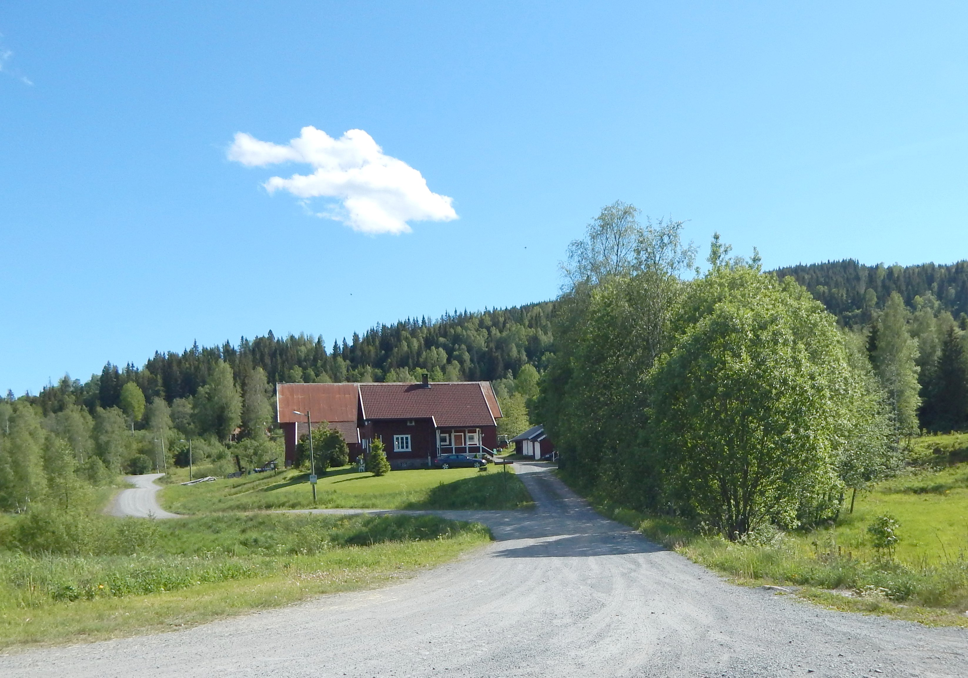 Vennerbakken sett fra Sørkedalsveien